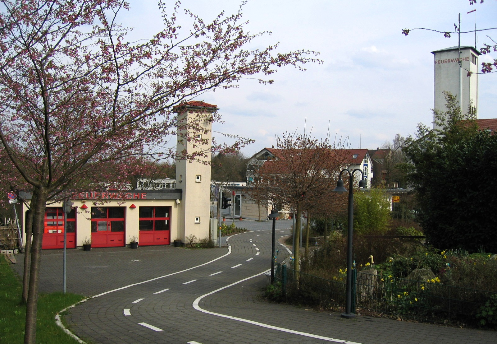 Description: Kinderbrandschutzzentrum Floriansdorf Iserlohn in Iserlohn. Source: selbst fotografiert Date: 21. Apr. 2006 Author: Bubo